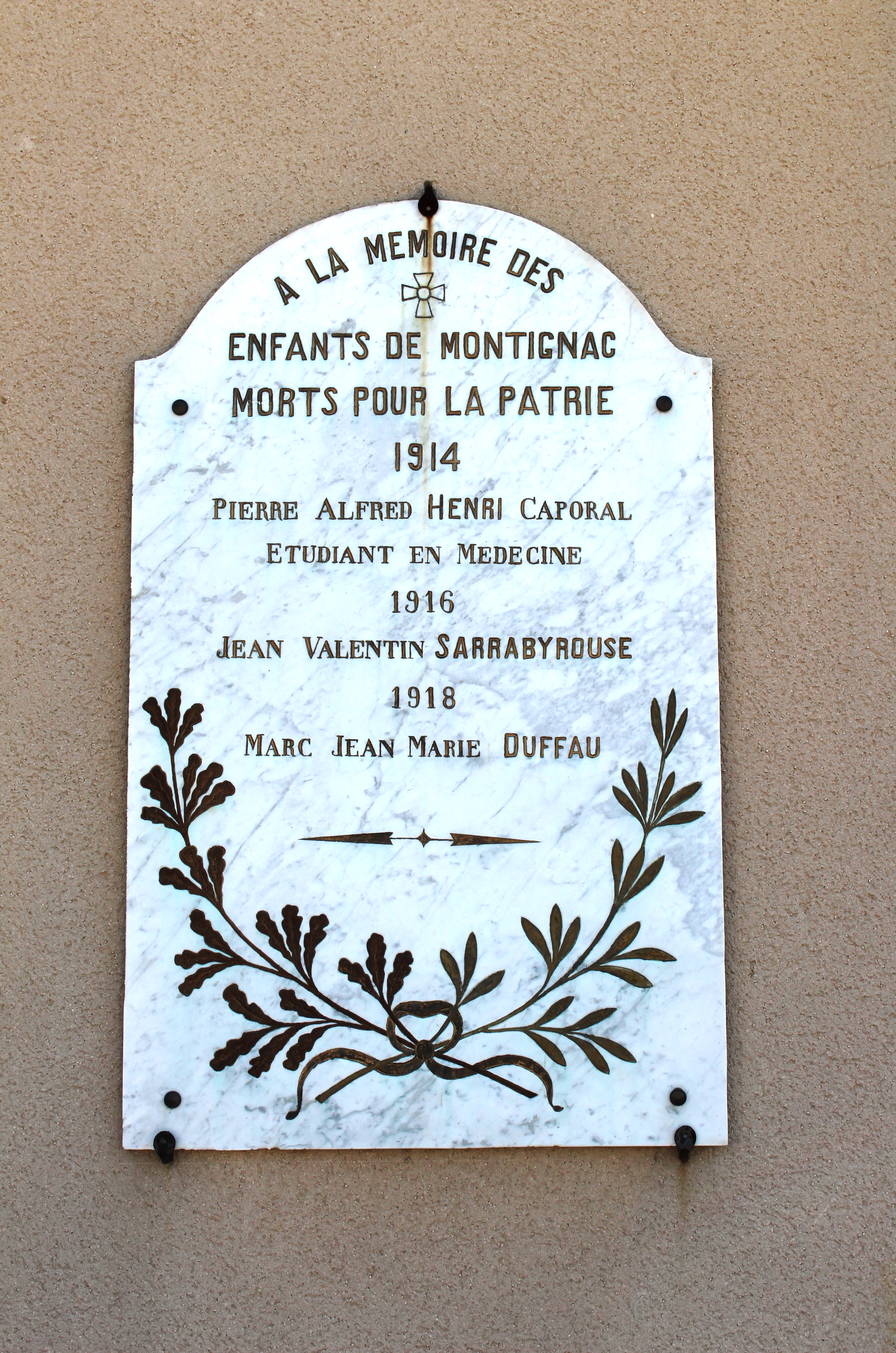 Monument aux morts de Montignac (Hautes-Pyrénées)